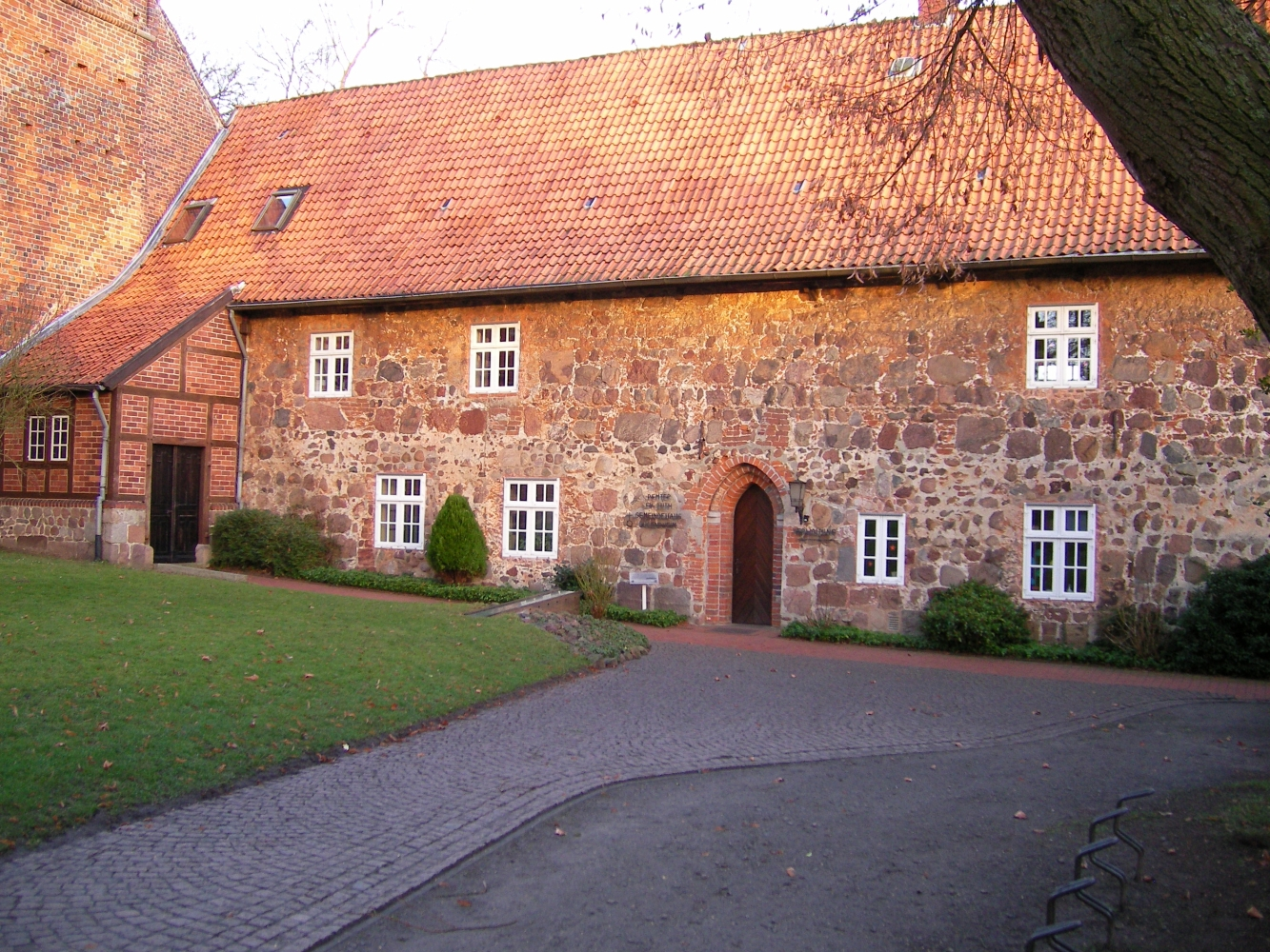 Remter in Wildeshausen (Haupteingang)